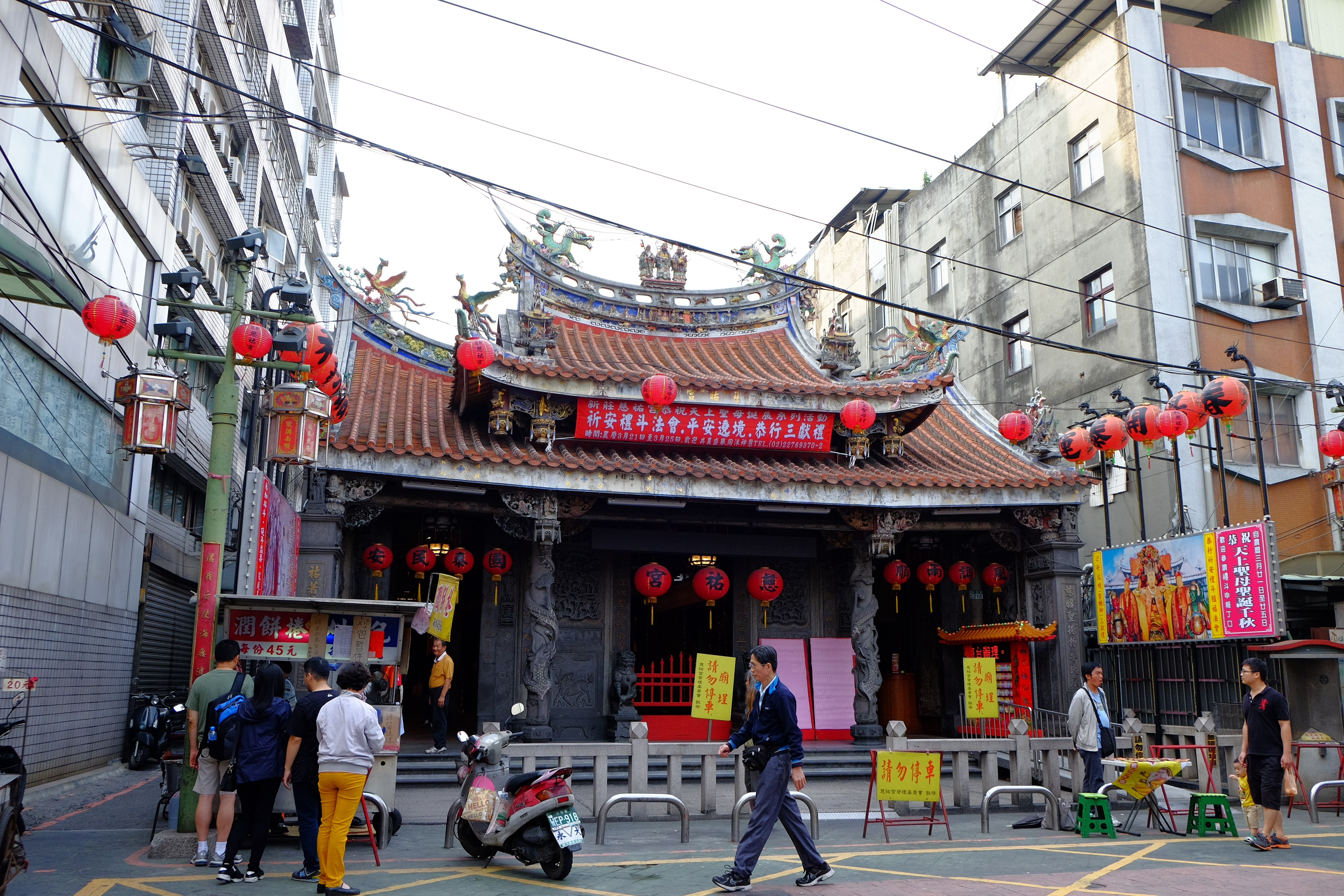 新莊慈祐宮